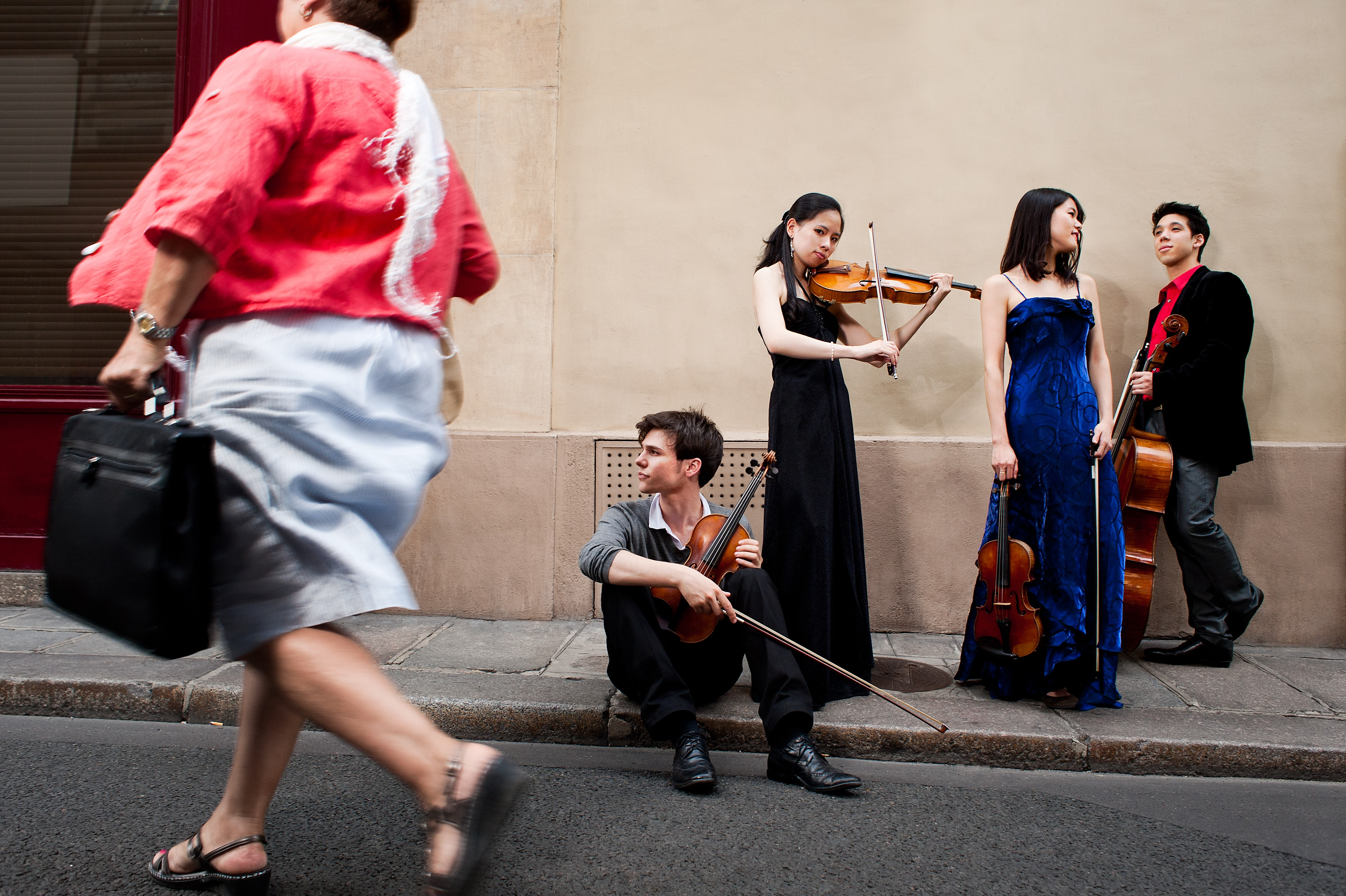 Fotografie des Quatuor Hermès: Elise Liu und Omer Bouchez (Violinen), Lou Yung-Hsin Chang (Viola), Anthony Kondo (Violoncello)